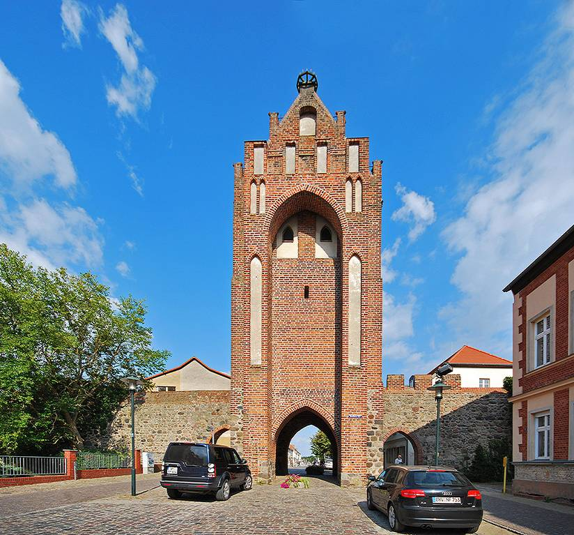 Berliner Tor Templin